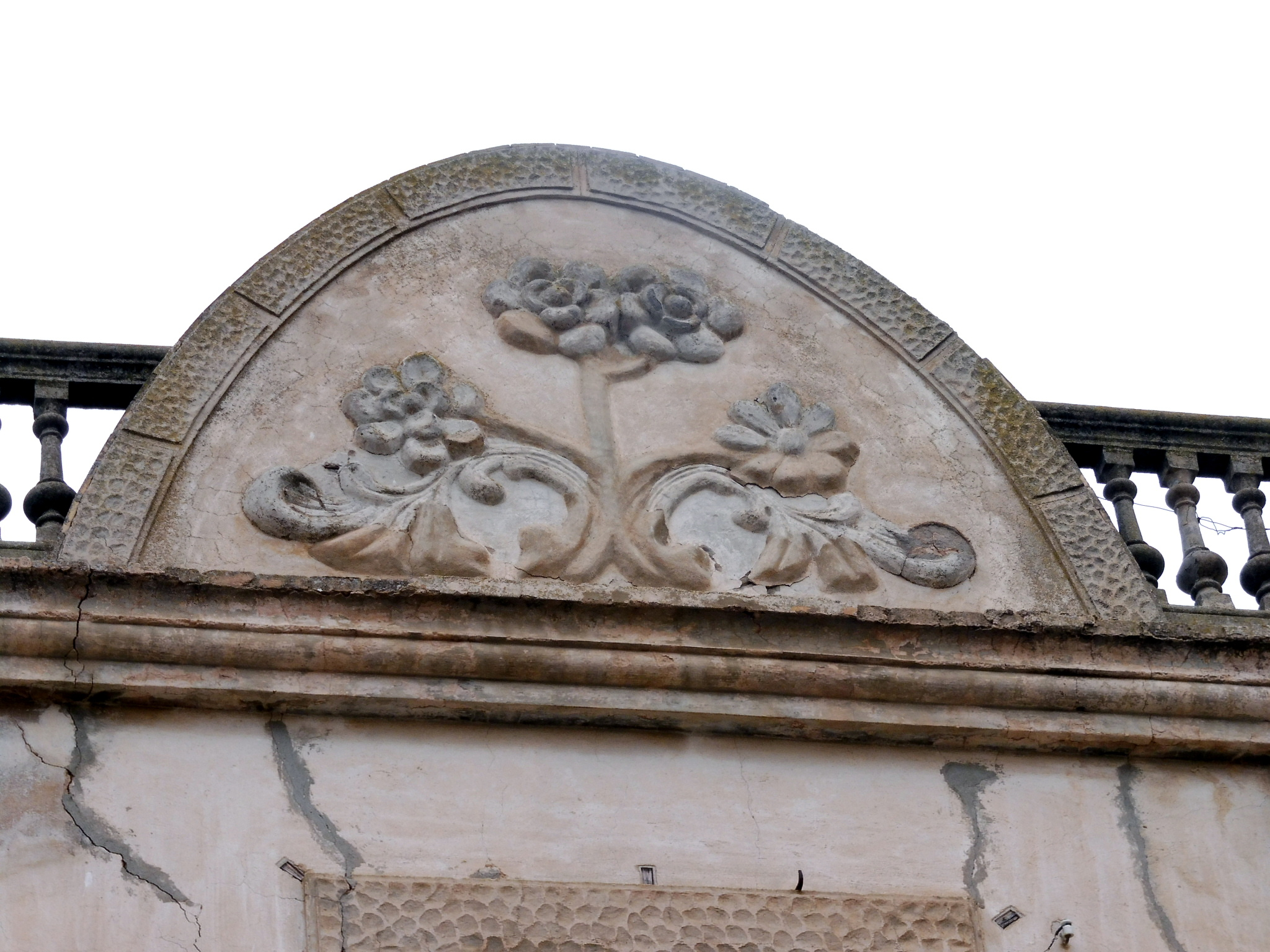 Cal Boada de Boldú (la Fuliola): detall de la balustrada